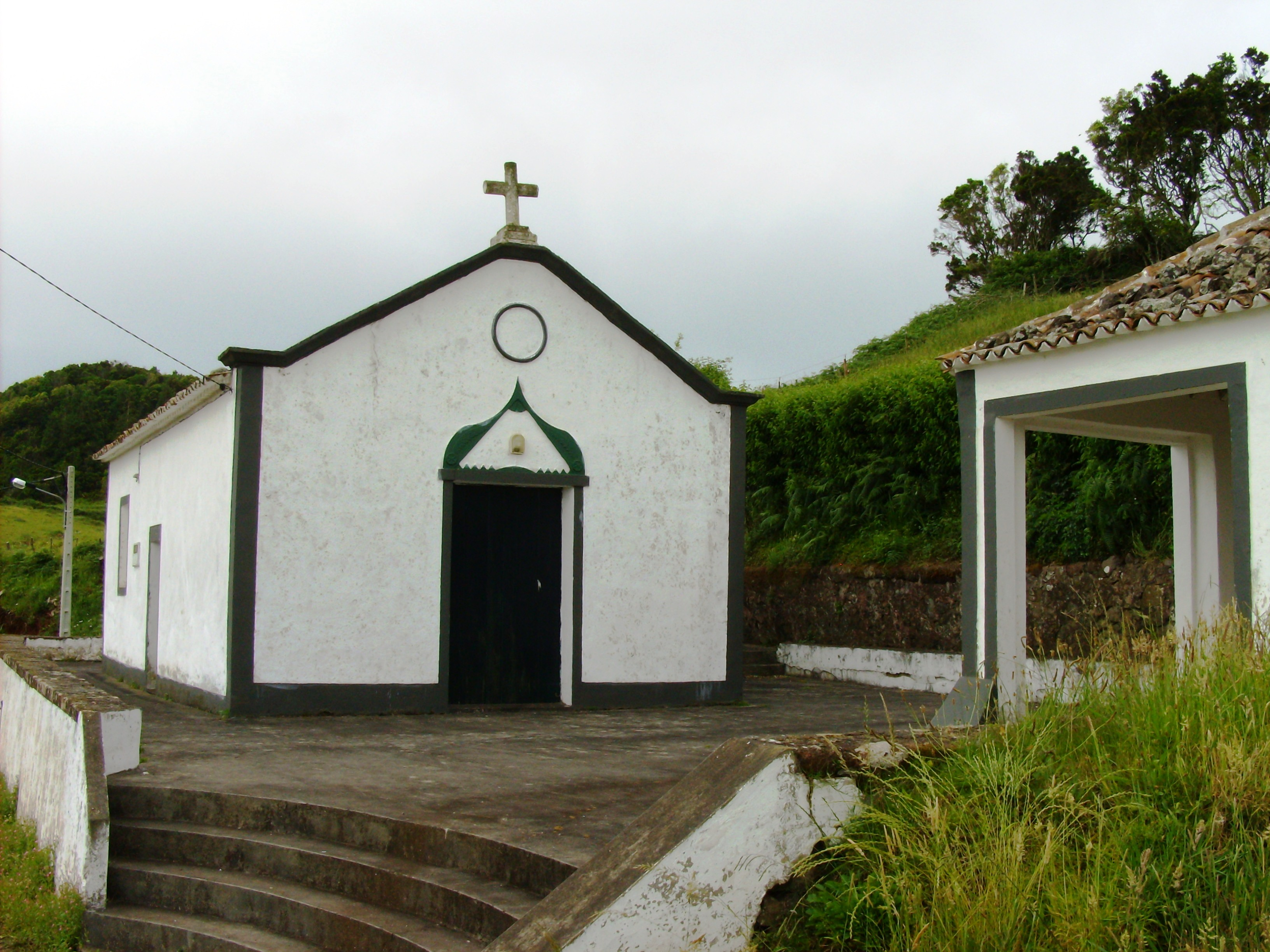 Ermida de Nossa Senhora da Glória, Ilha de Santa Maria (Açores), Portugal